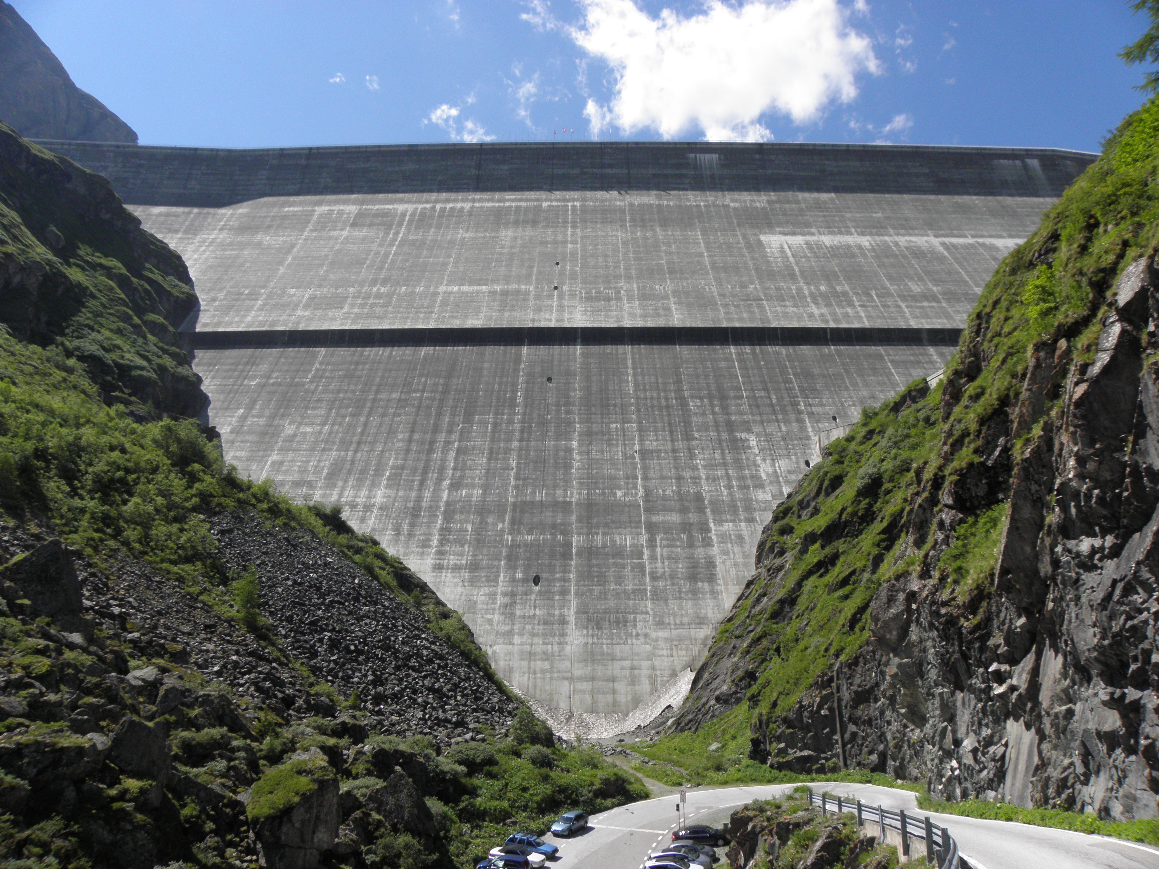 Unterhalb der Staumauer des Lac des Dix im Schweizer Wallis.